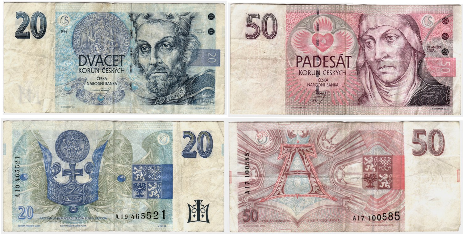 20 und 50 tschechische Kronen - Geldscheine